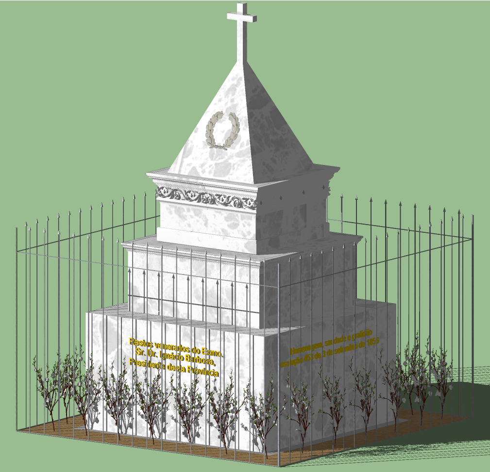 Antigo túmulo de Inácio Barbosa, inaugurado em 18/02/1858 e já removido, todo em mármore vindo de Pernambuco, ficava localizado nos fundos da casa de Oração São Salvador (atual igreja São Salvador) na rua do barão (atual rua João Pessoa). Google Armazém 3D